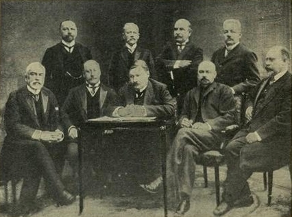 Состав дирекции Русского Музыкального Общества в 1909 году. Сидят слева С. М. Сомов, А. И. Вышнеградский, А. К. Глазунов, Н. В. Арцыбушев, М. М. Курбанов. Стоят, слева: В. П. Лобойков, А. И. Чайковский, И. В. Шимкевич, М. Л. Нейшеллер.